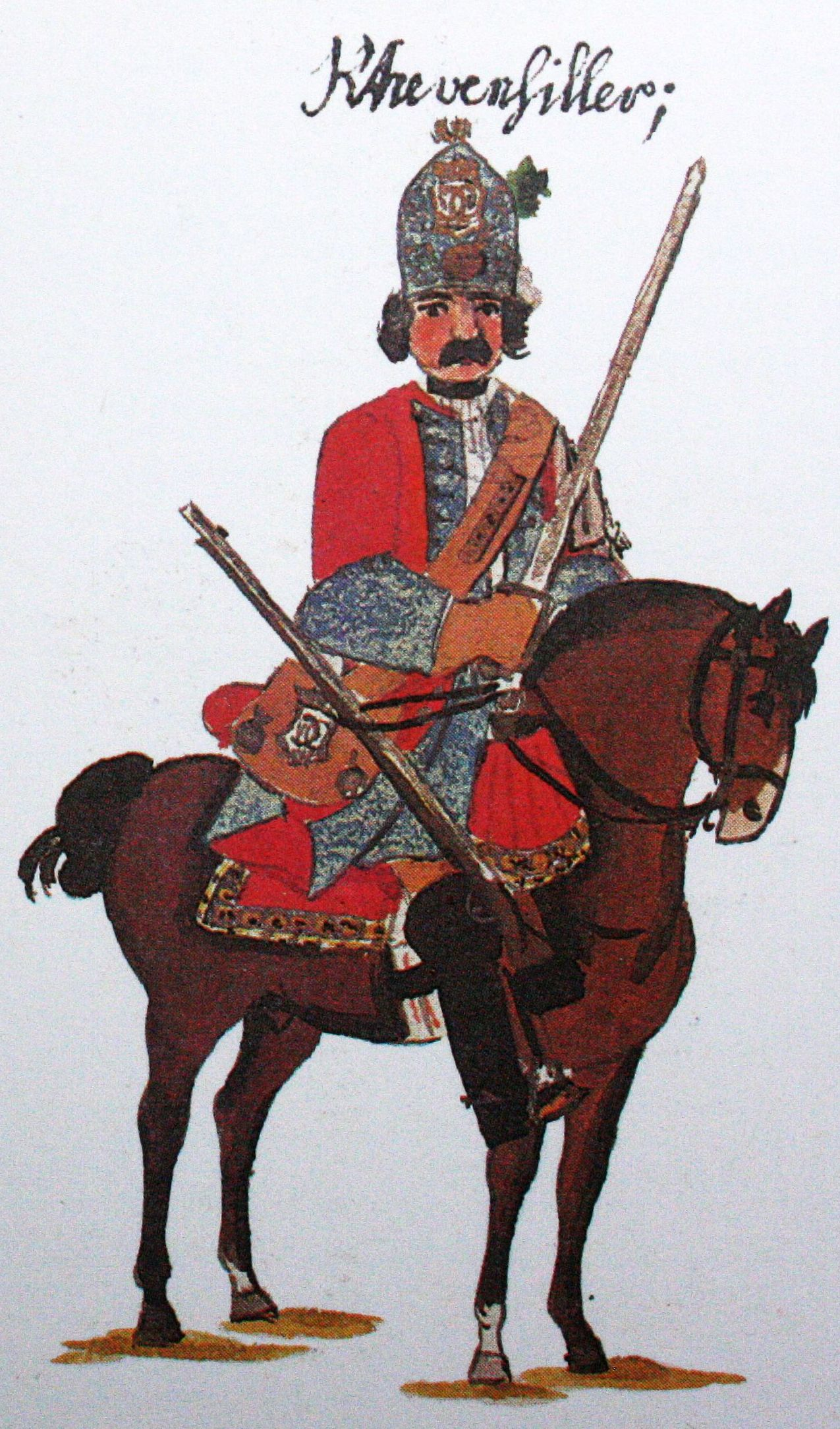 Kaiserliches_Dragonerregiment_D_V_1734